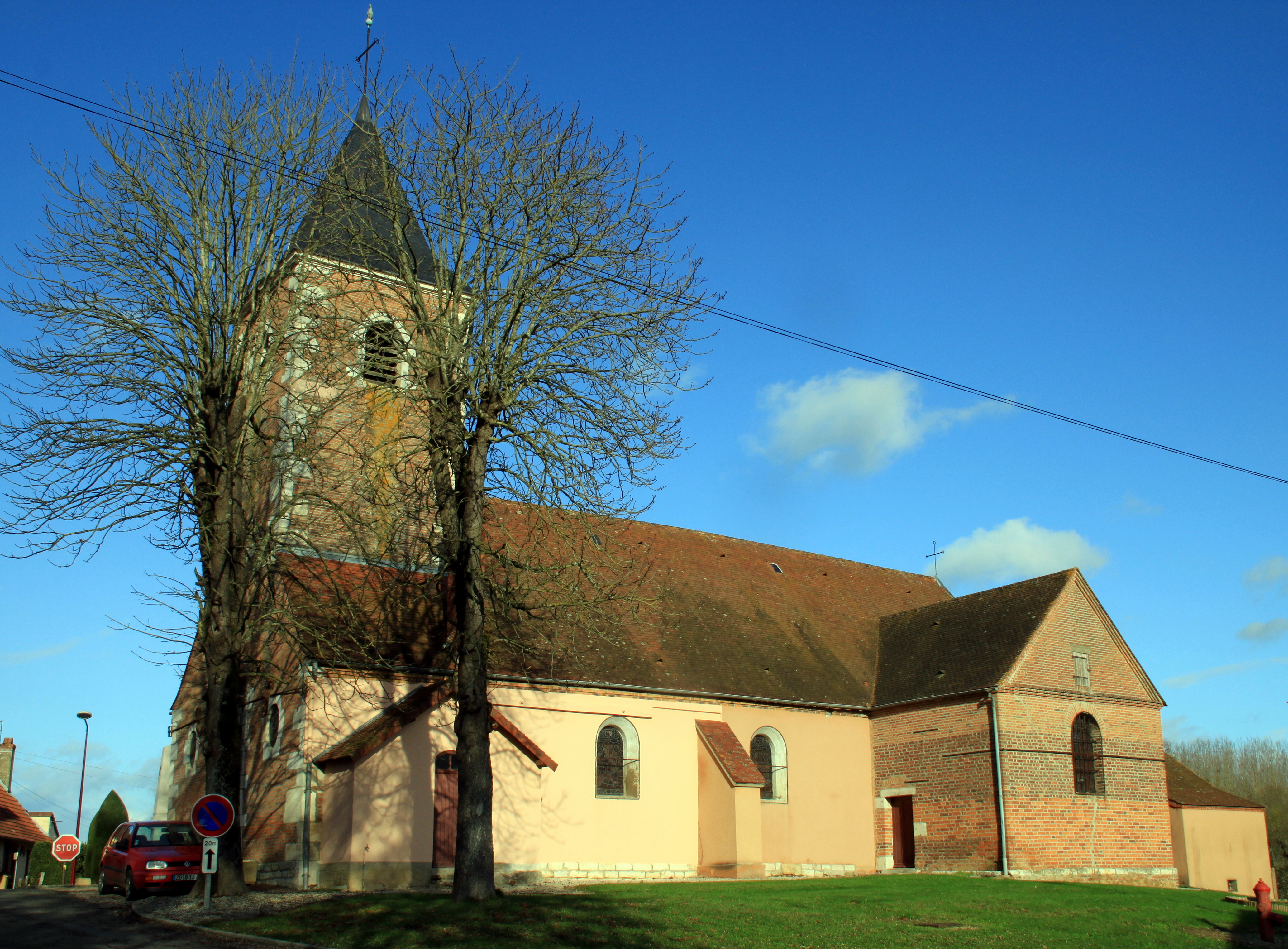 Saint-Bonnet-en-Bresse Kirche